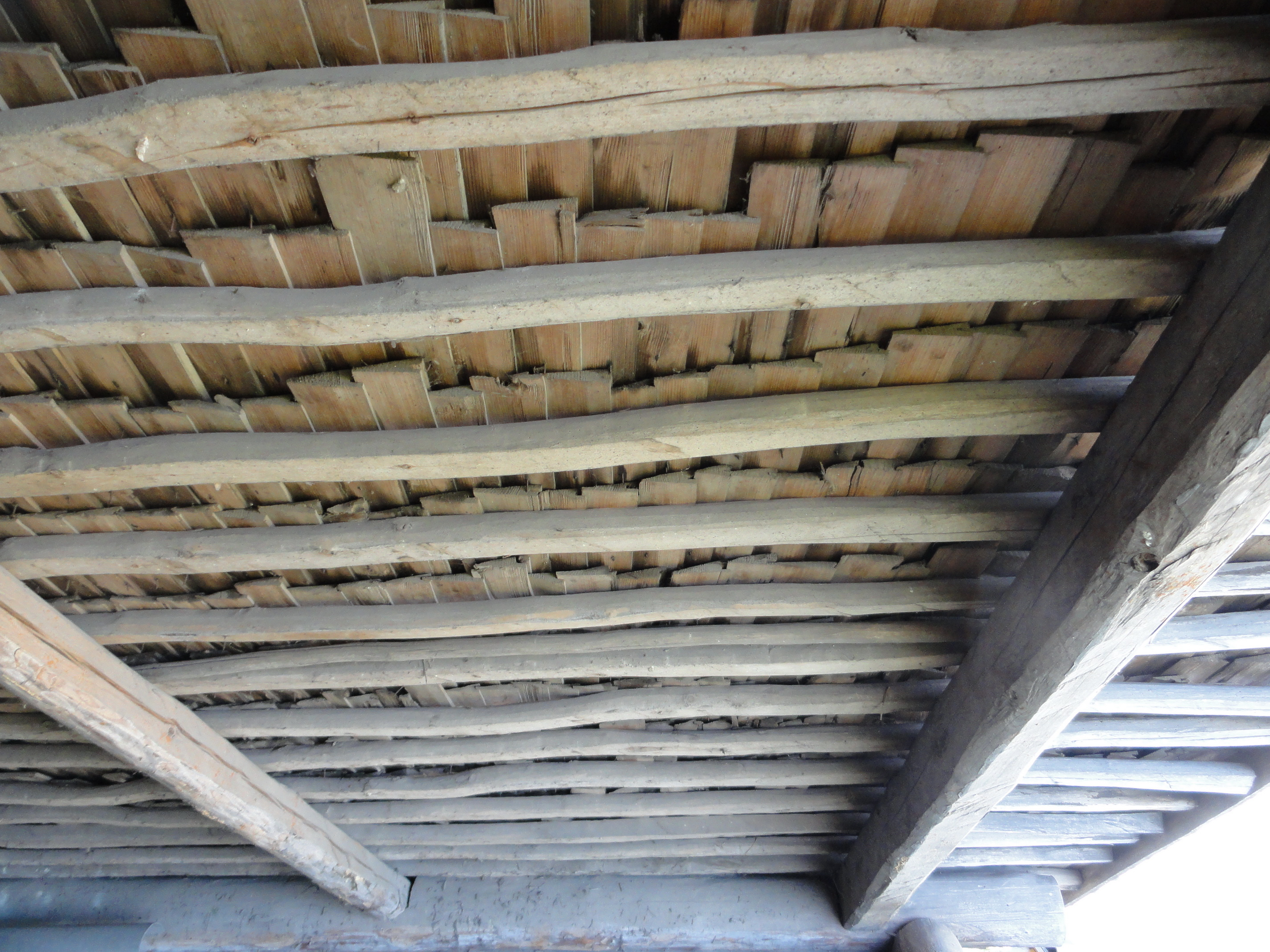 Кровля из гонты (с обратной стороны)